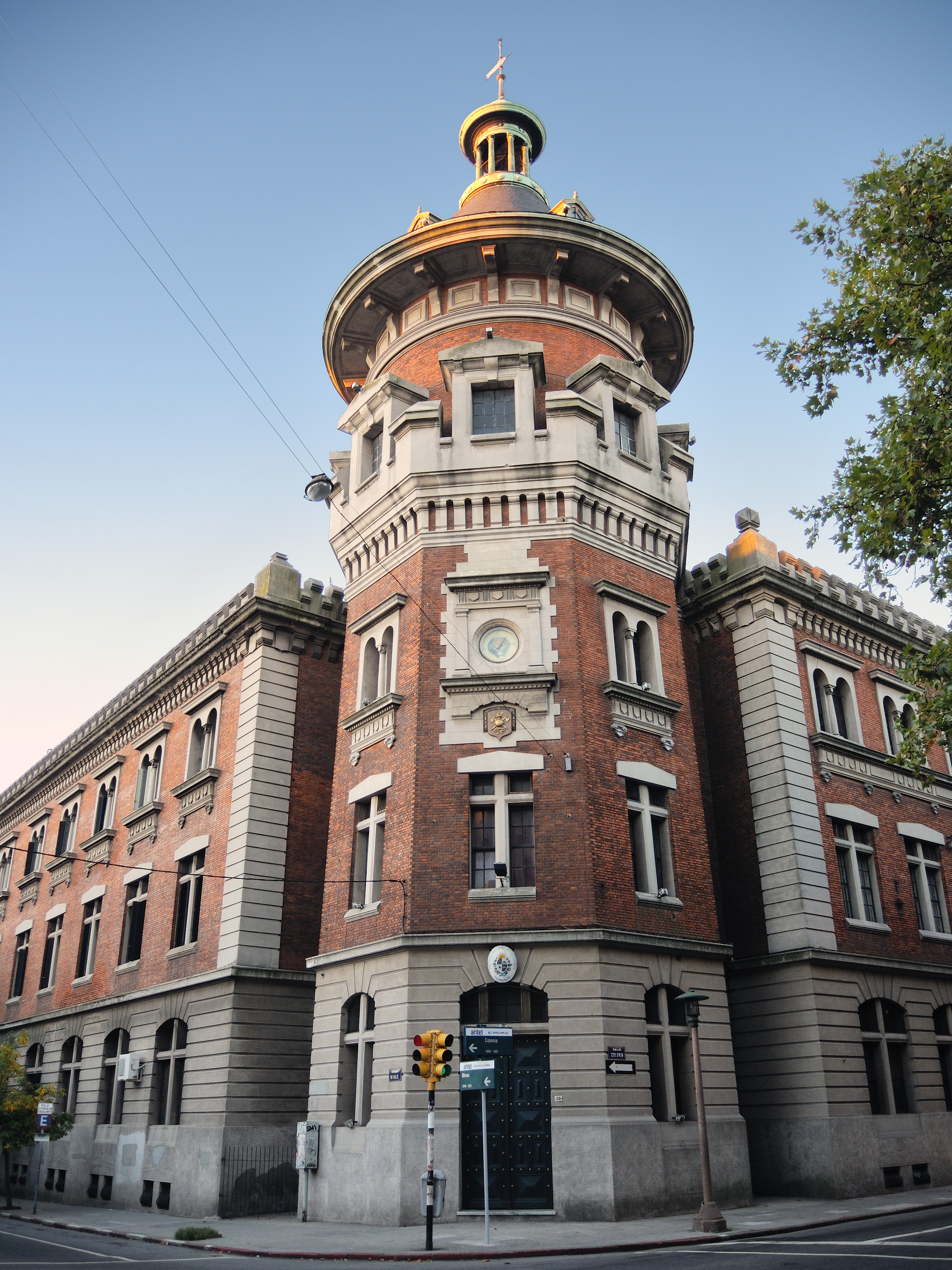 Cuartel Centenario sede de la Dirección Nacional de Bomberos, Montevideo, Uruguay